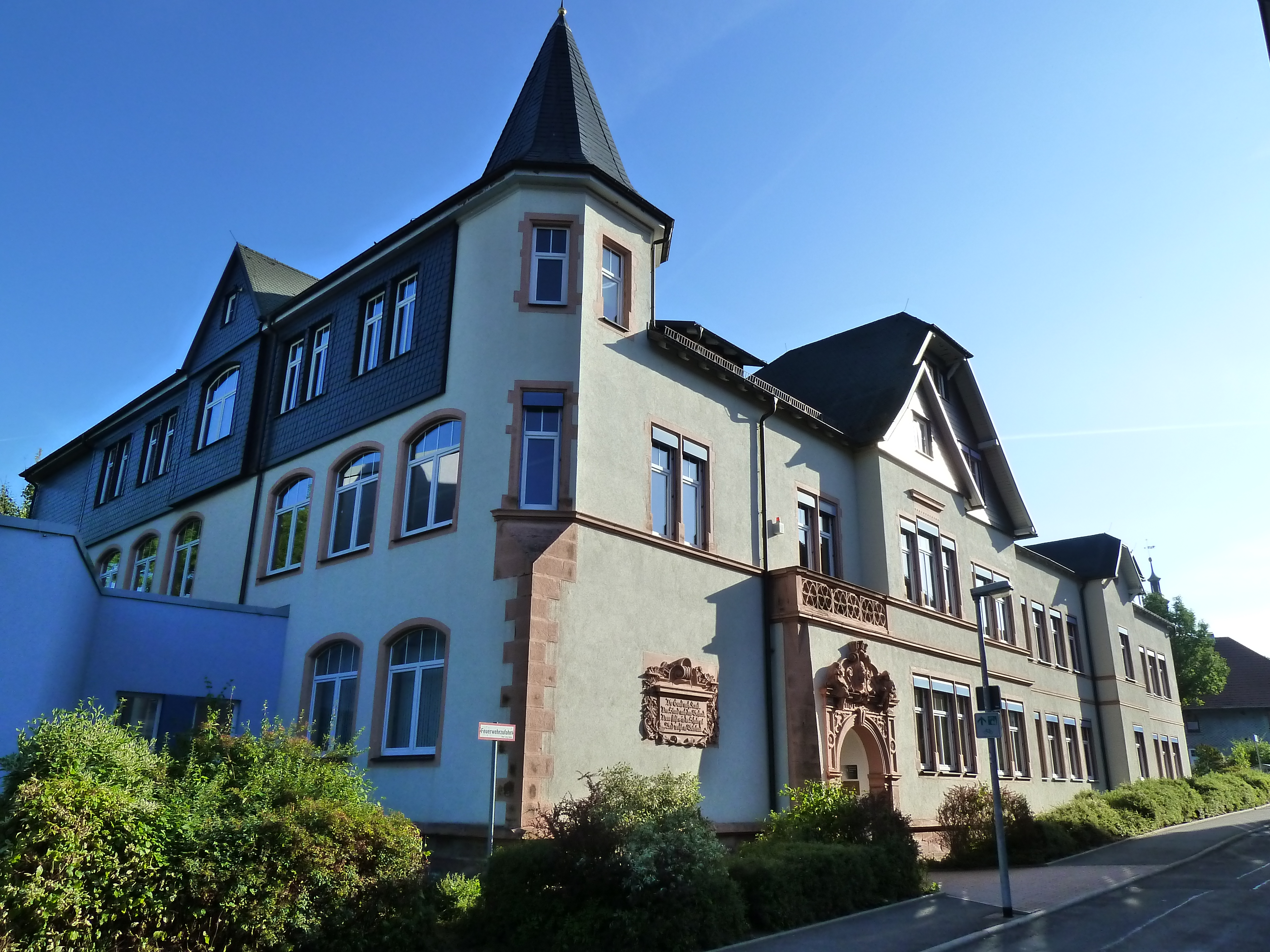 Staatliche Regelschule Thüringen - Lutherschule Zella-Mehlis